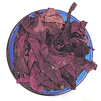 Dulse, edible algae